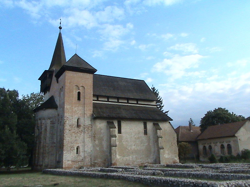 A boldvai református templom, mellette a XII. századi monostor romjai. A kép 2007.08.05-én készült. This is a photo of a monument in Hungary, Identifier: 2692